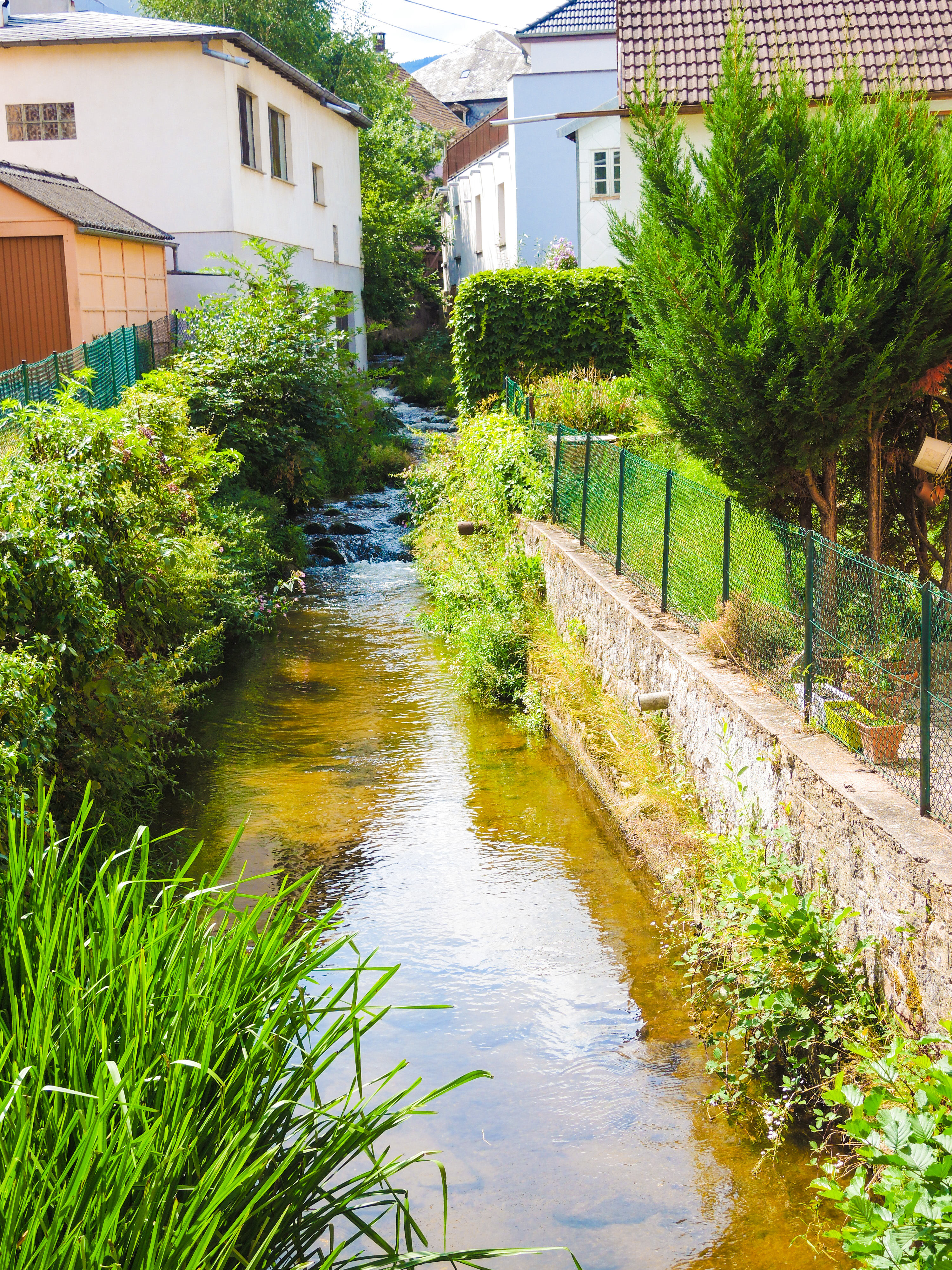 Ruisseau la Weiss, à Orbey. Haut-Rhin